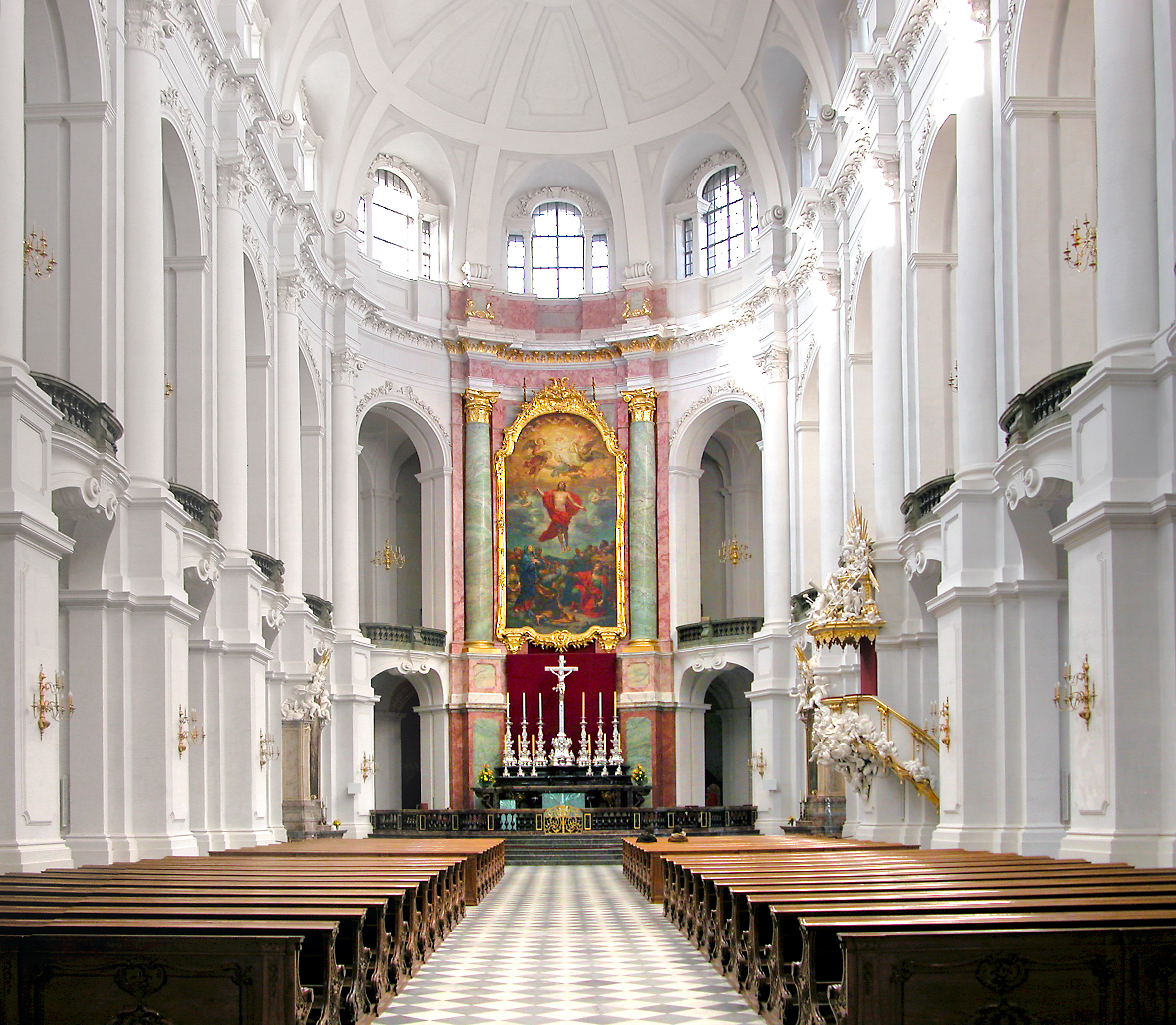 07.02.2007 01067 Dresden, Schloßplatz: Kathedrale Ss. Trinitatis (kath. Hofkirche). Erbaut 1739-1751 von Gaetano Chiaveri. Bau beendet von Sebastian Wetzel und Johann Christoph Knöffel. Altargemälde von Anton Raphael Mengs 1750-52. [DSCN20801.TIF]20070207015MDR.JPG(c)Blobelt